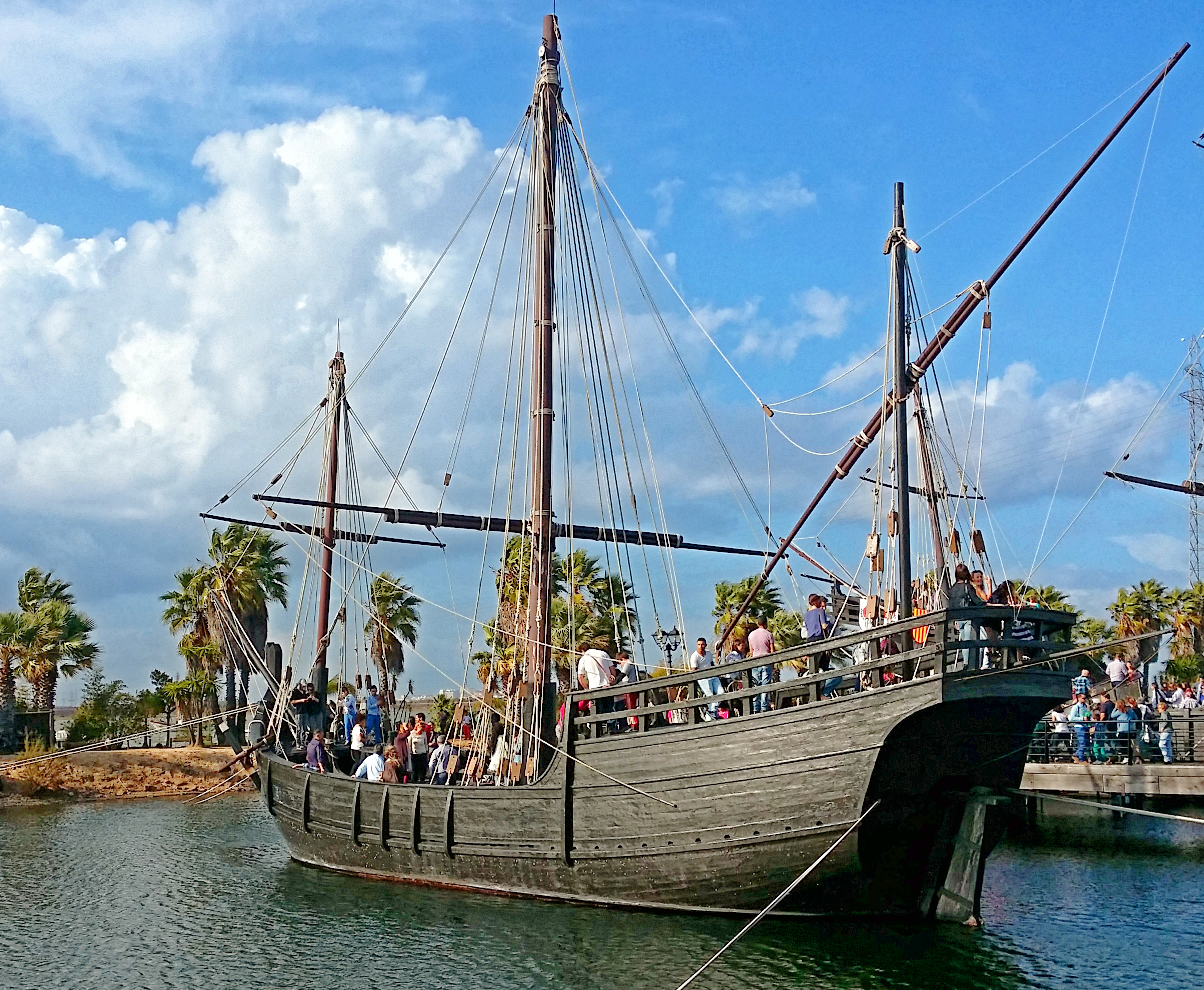 Muelle de las carabelas. La Rabida